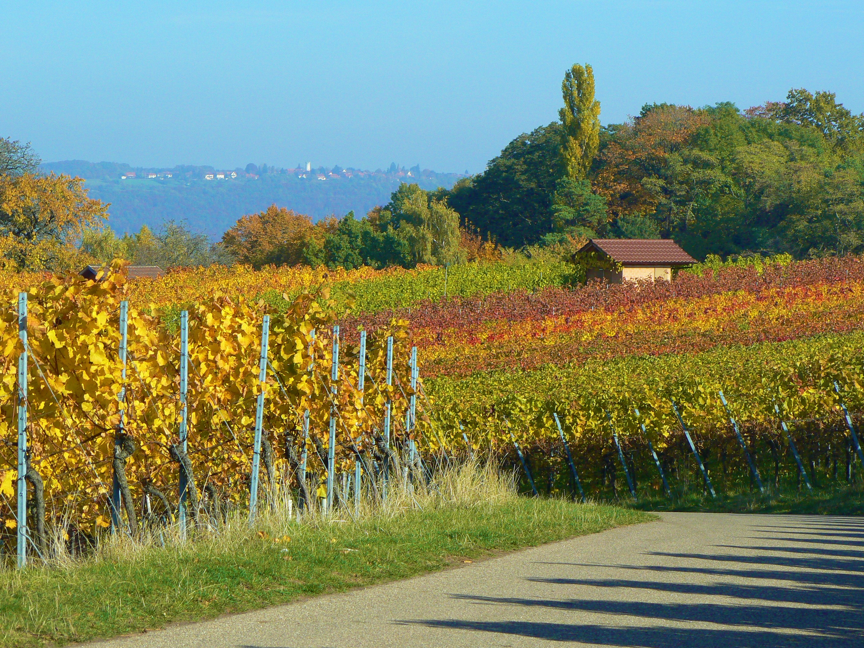 2016-11-01 Weinstadt-Karlstein gegen Remshalden-Buoch